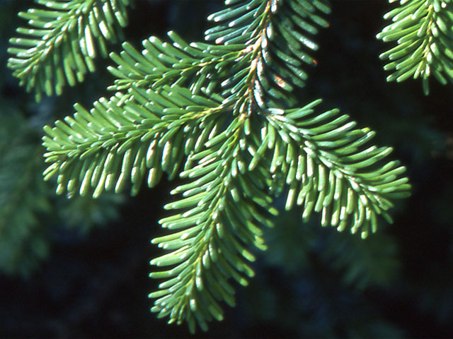 Hojas de Abies mariesii en Senjyou-dake, Sierra Akaishi, Japon. オオシラビソの葉。南アルプス・仙丈岳にて撮影。